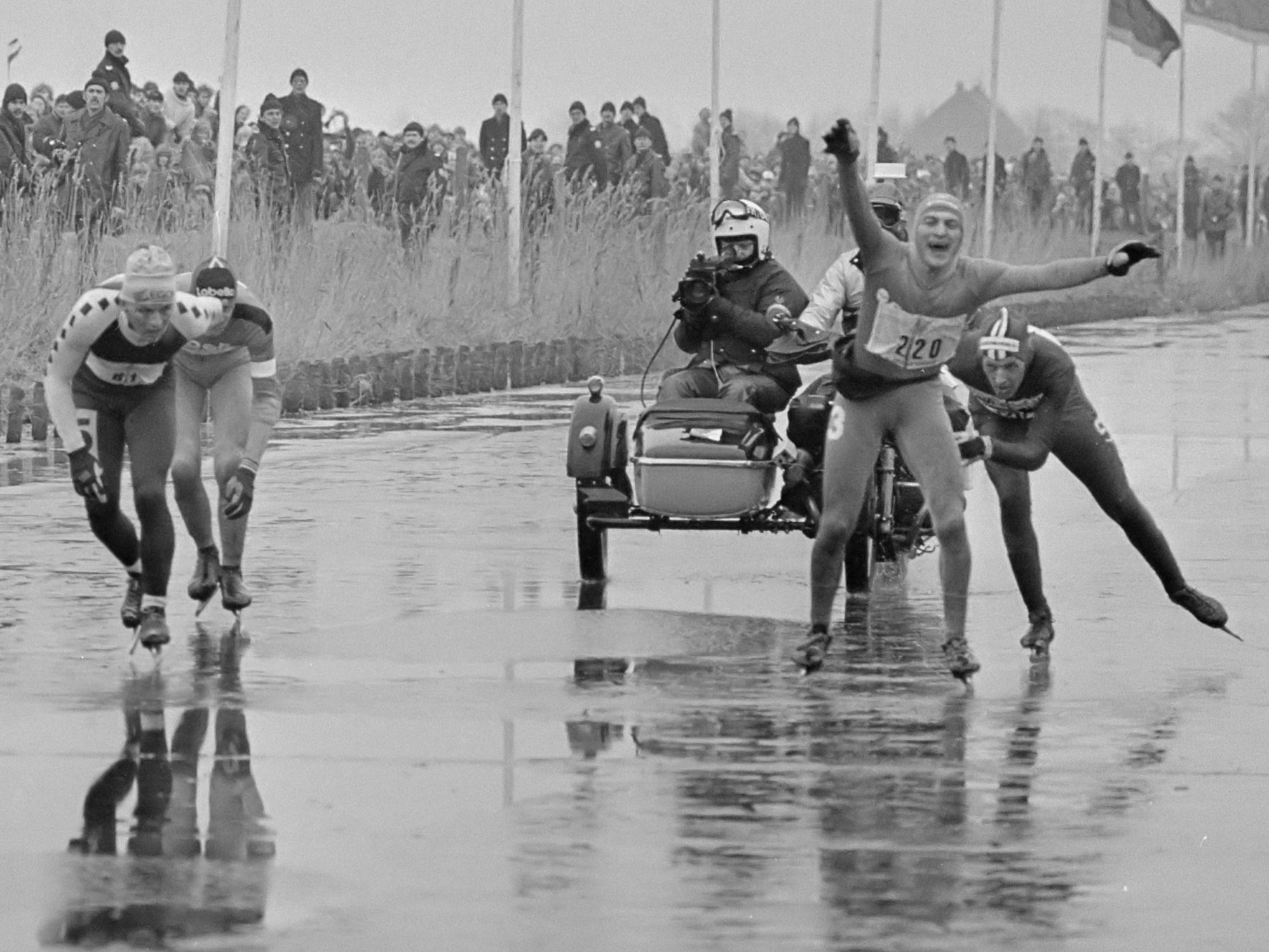 Elfstedentocht 1985, finish Leeuwarden; finish van de kopgroep v.l.n.r. Ruitenberg, Kooiman, winnaar Van Benthem en Niesten 21 februari 1985